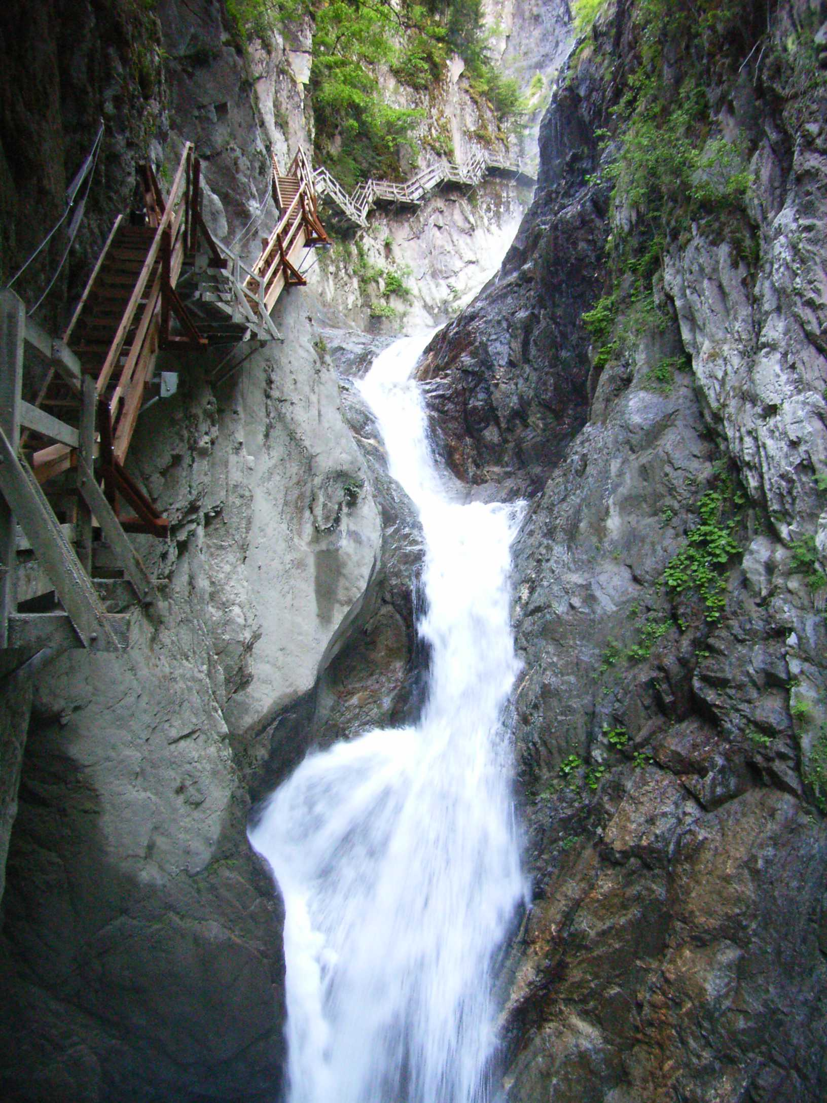 Gorges du Durnand, Schweiz/Valais